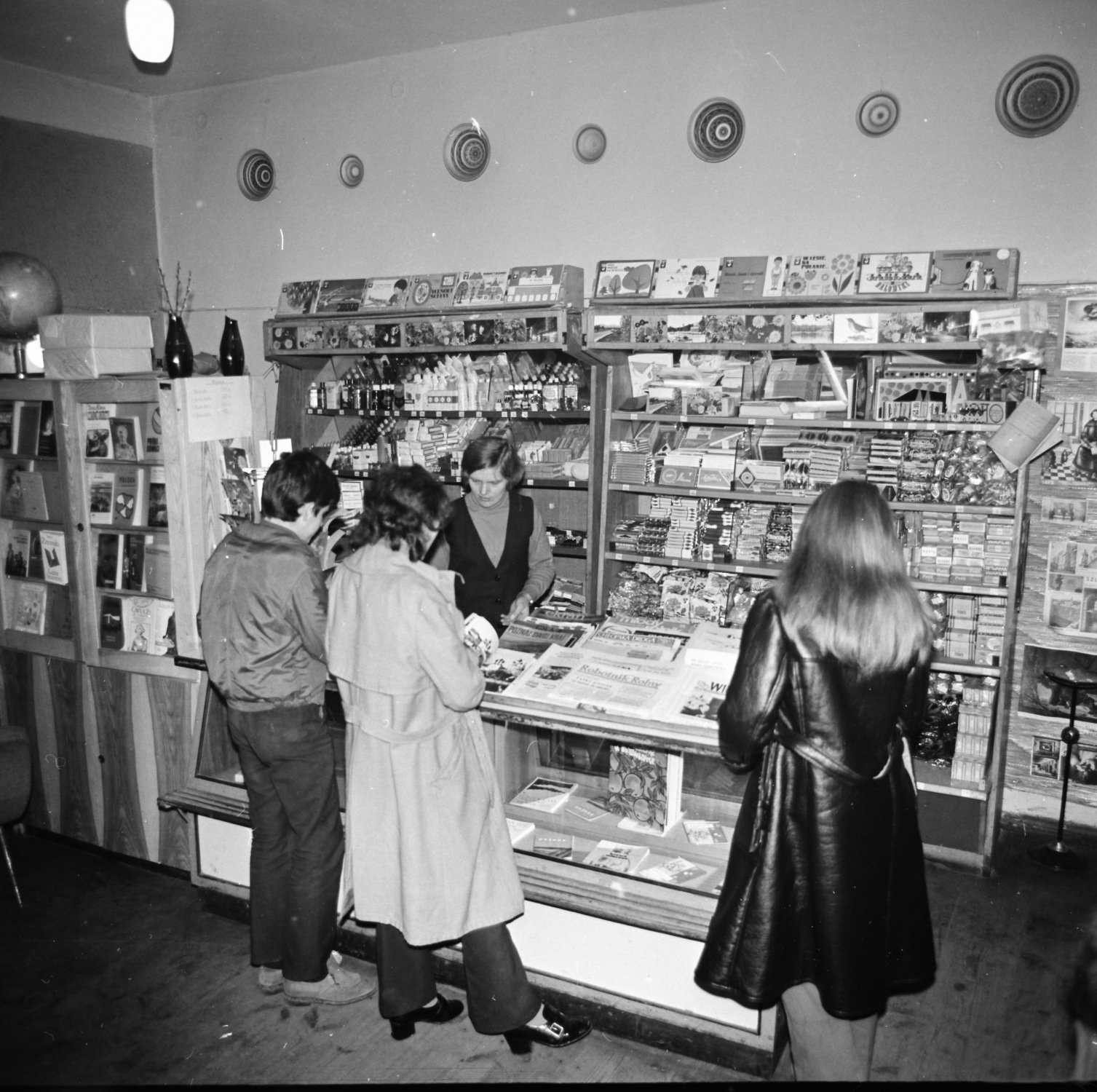 Lubrza. Wnętrze Klubu Prasy i Książki "Ruch".